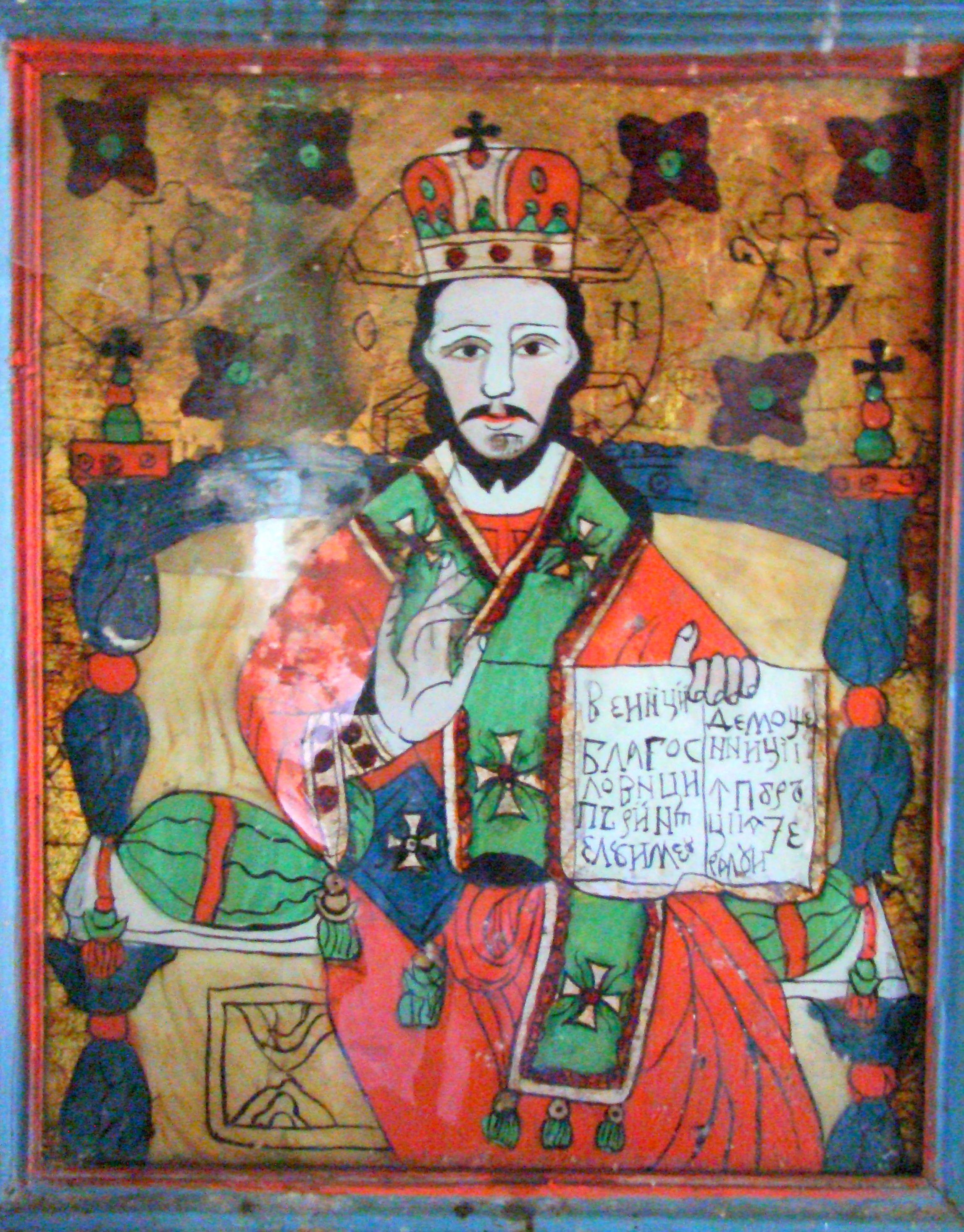 Biserica de lemn „Sf.Arhangheli” din Boiereni, județul Maramureș